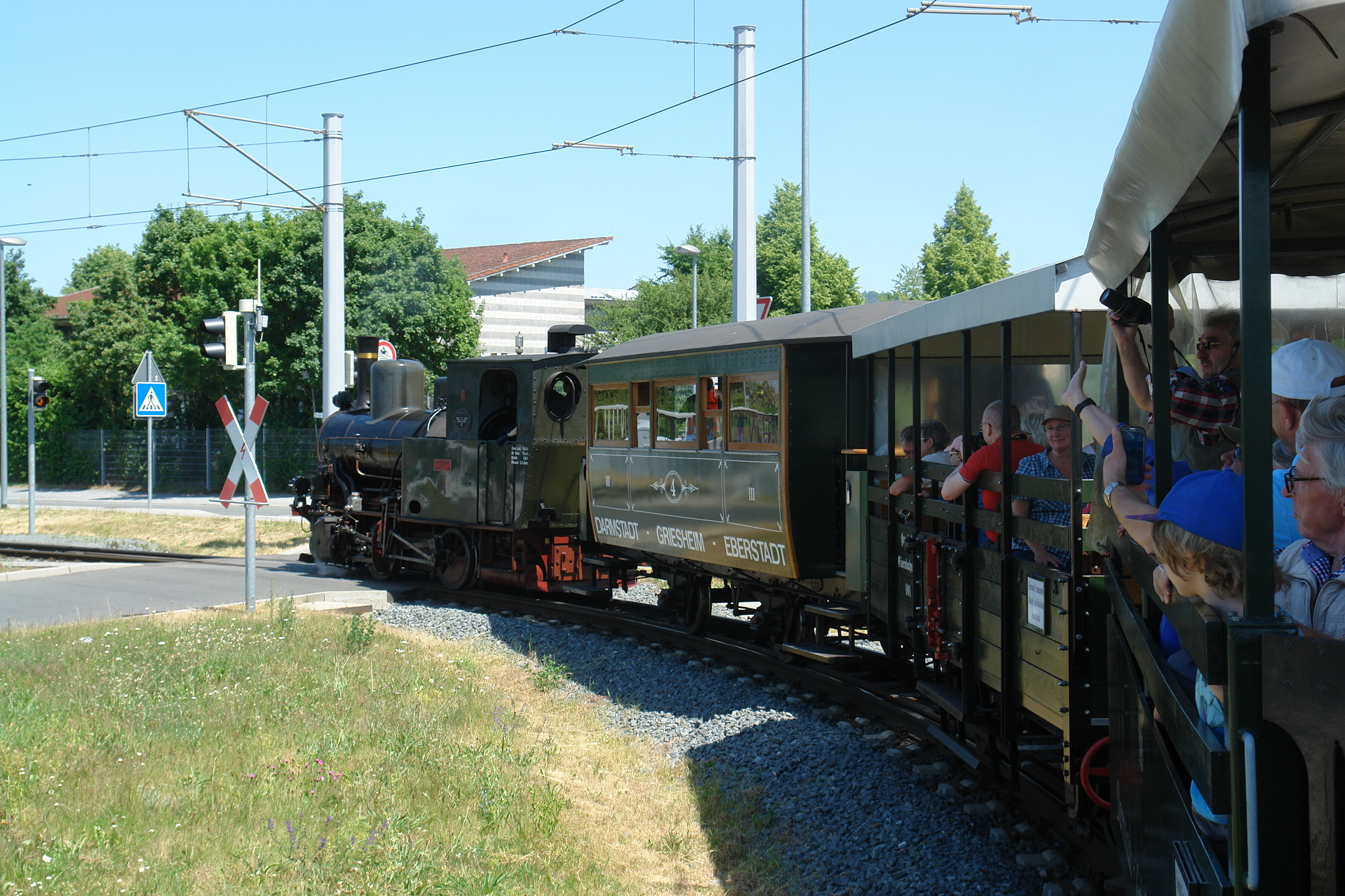 Der Feurige Elias in Darmstadt der ARGE Historische HEAG-Fahrzeuge im Eisenbahnmuseum Darmstadt-Kranichstein e.V. auf einer Fahrt von der Haltestelle Frankenstein (Seeheimer Straße 70) in Darmstadt-Eberstadt zur Haltestelle Am Hinkelstein in Alsbach am 4. Juni 2015